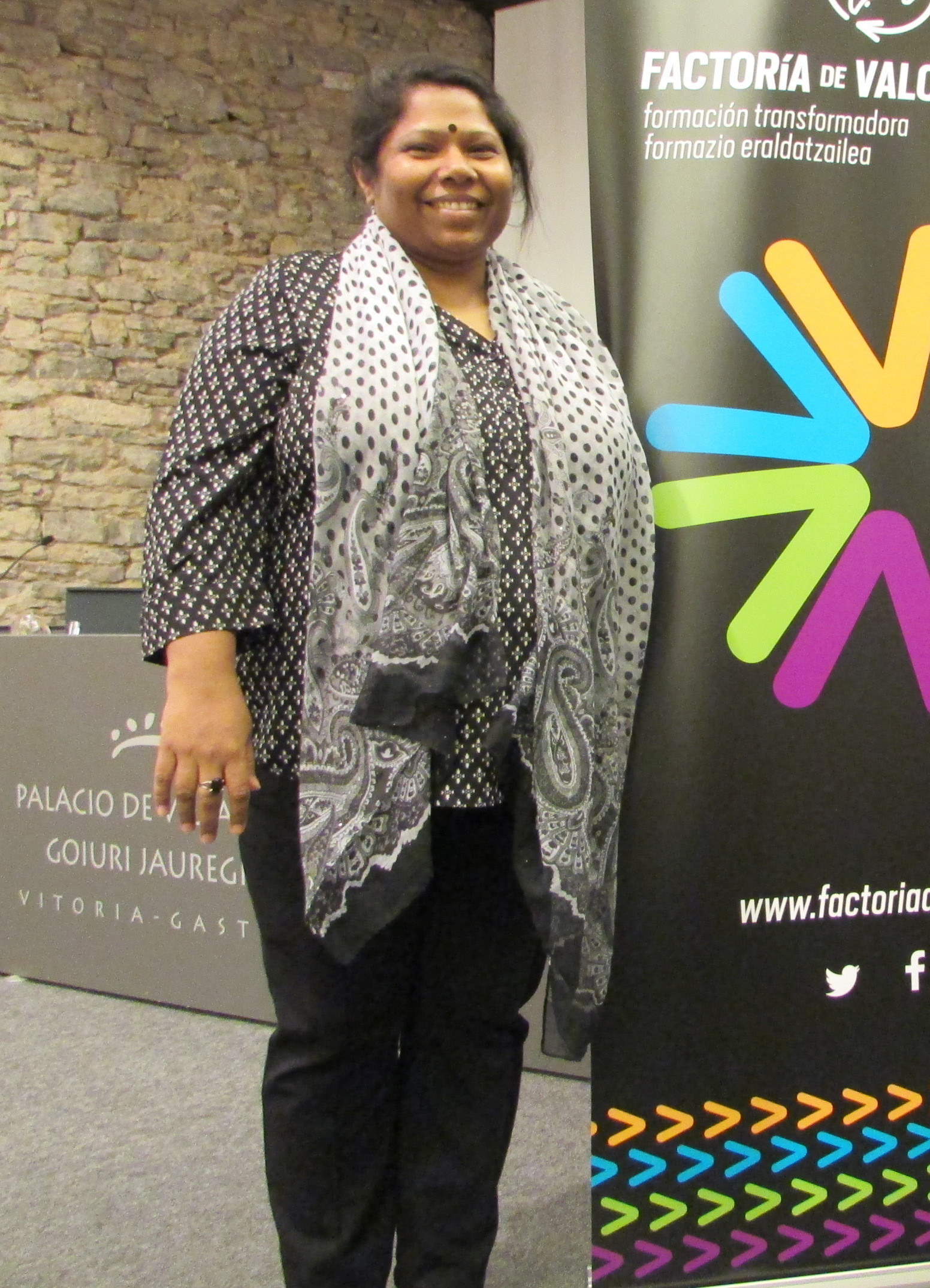 Kalpona Akter, en la charla que dio en el Palacio Villa Suso de Vitoria-Gasteiz para hablar sobre las condiciones de las trabajadoras del sector textil en Bangladesh.